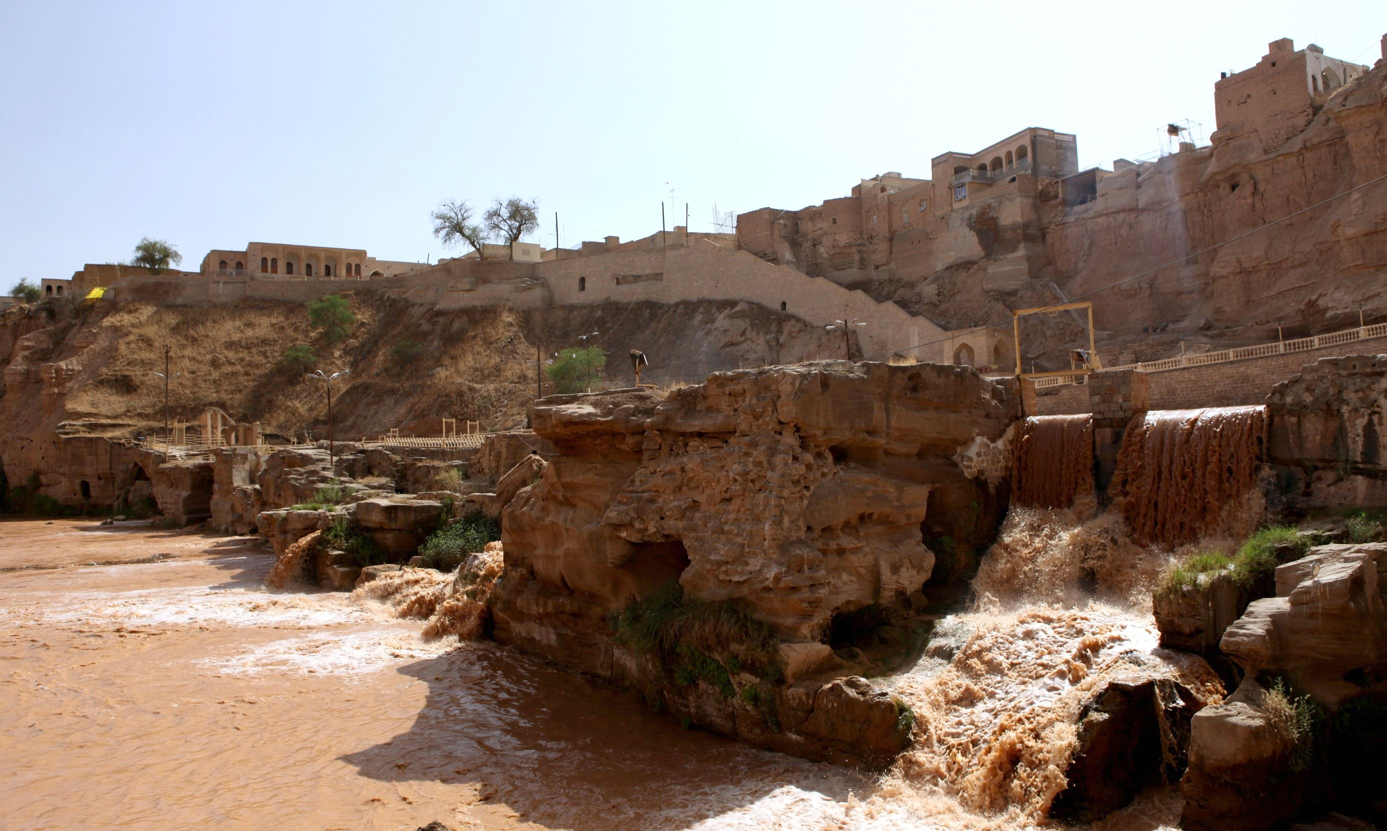 Shushtar, Iran